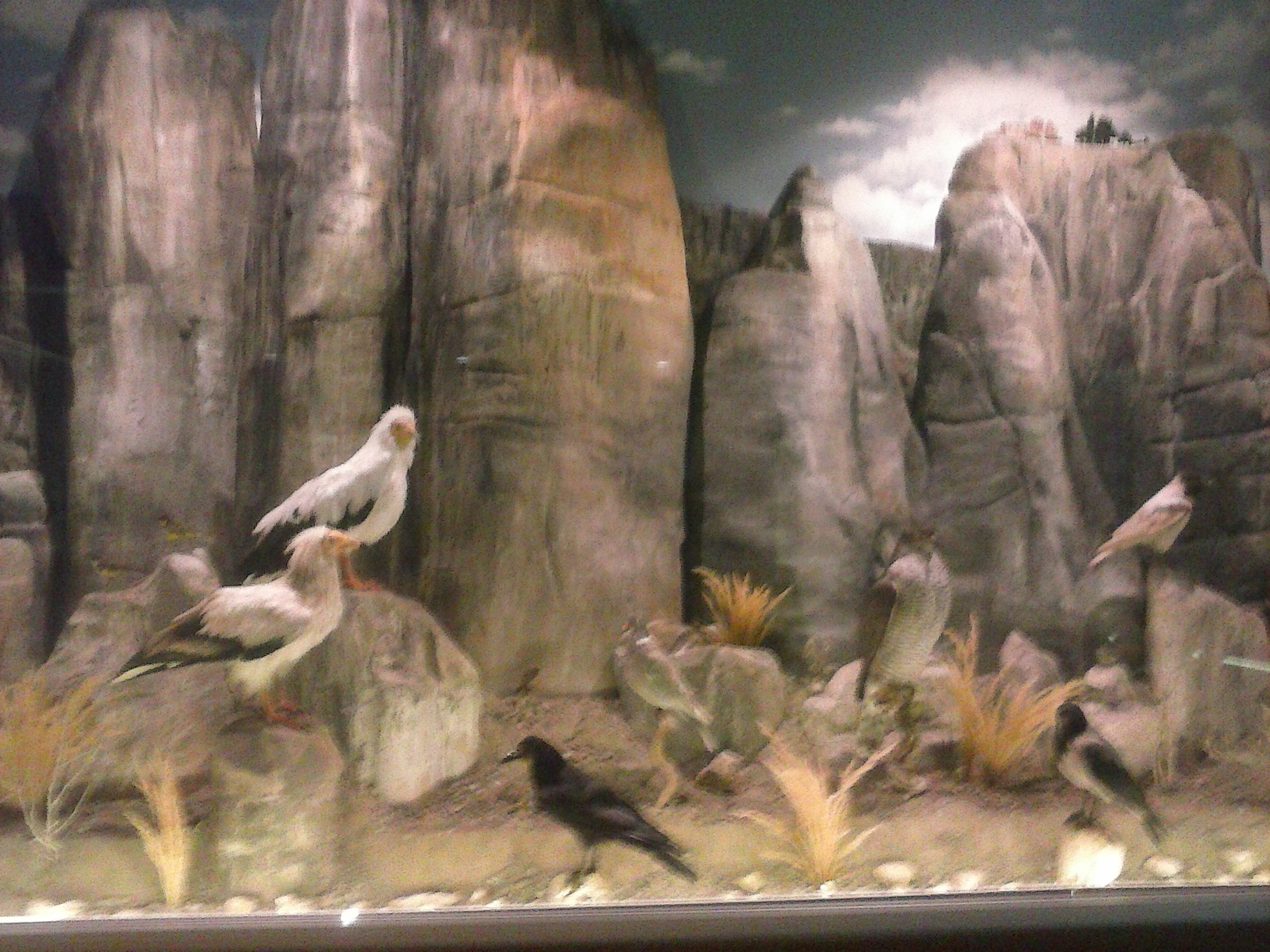 Η βιοποικιλότητα των Μετεώρων, Μουσείο Φυσικής Ιστορίας Μετεώρων